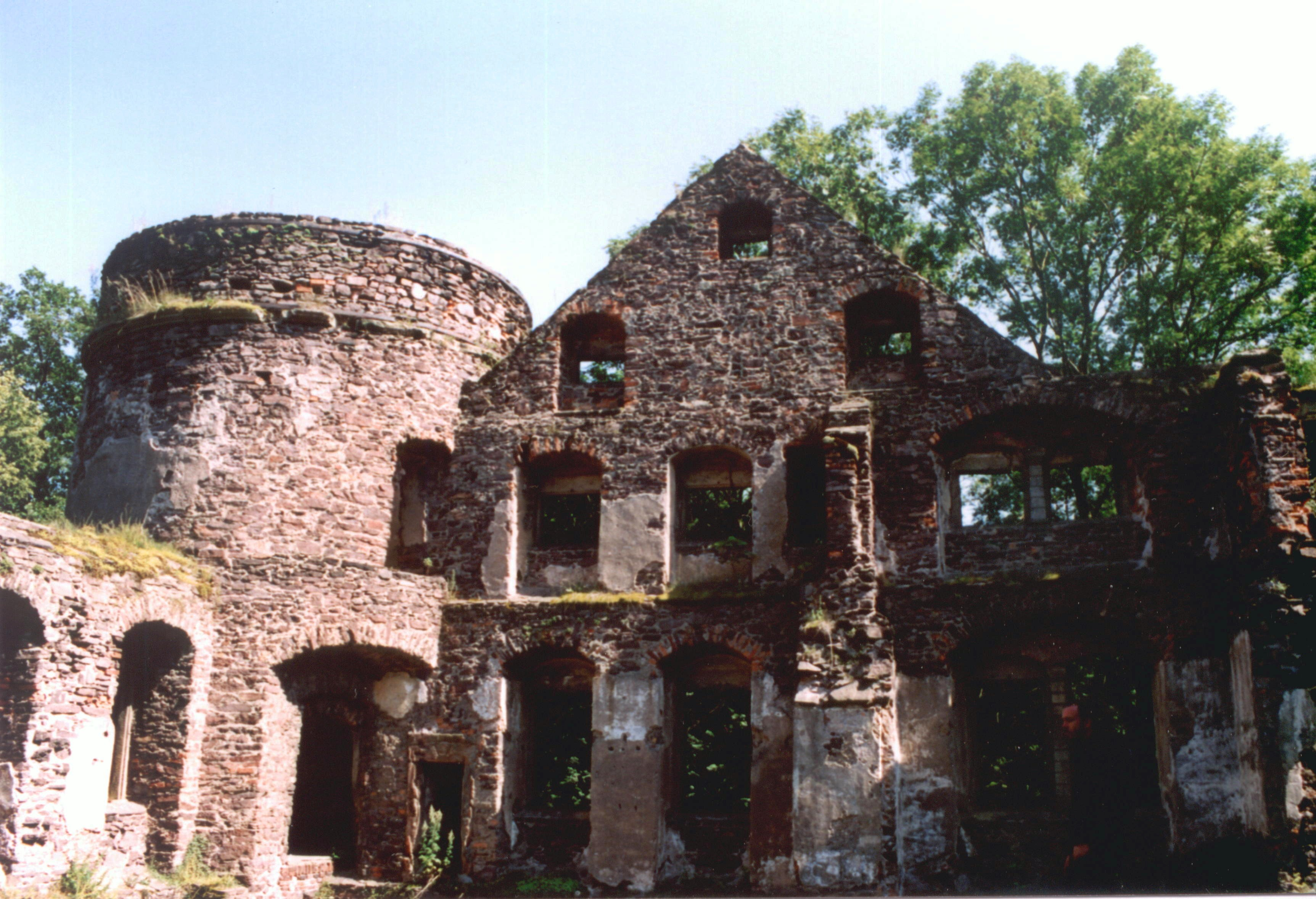 Ruiny zamku w Świnach w gminie Bolków